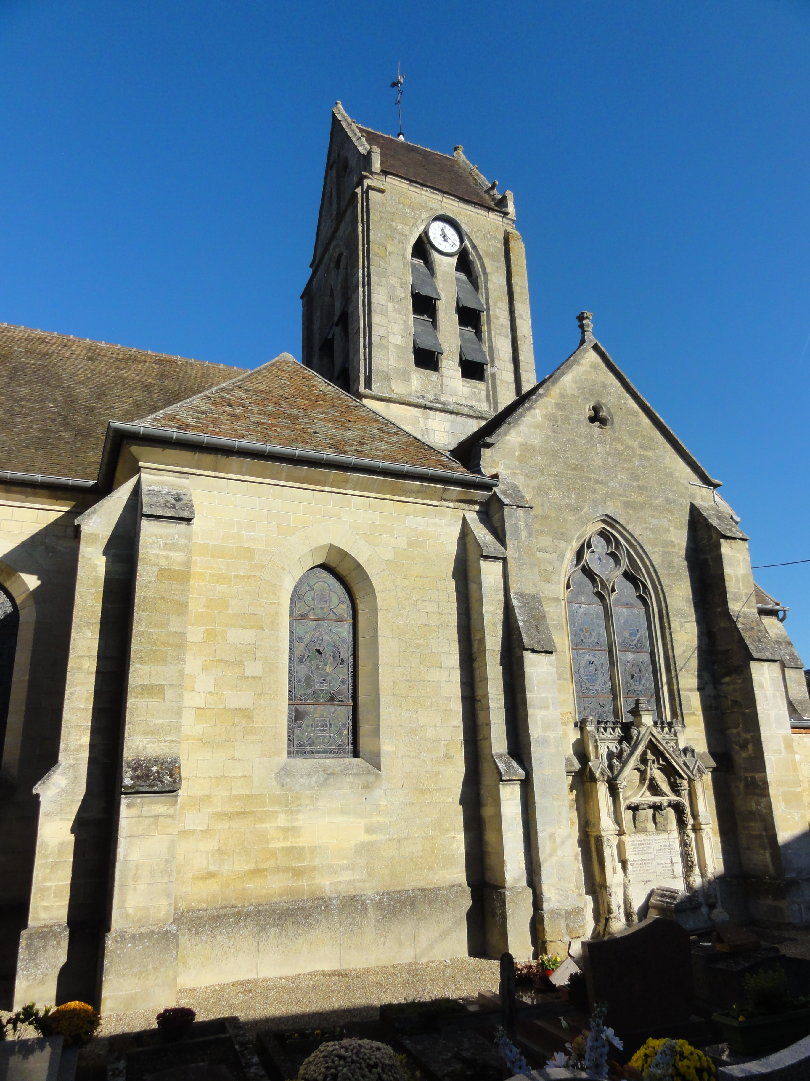 Église Saint-Pierre de Puiseux-Pontoise - voir titre.